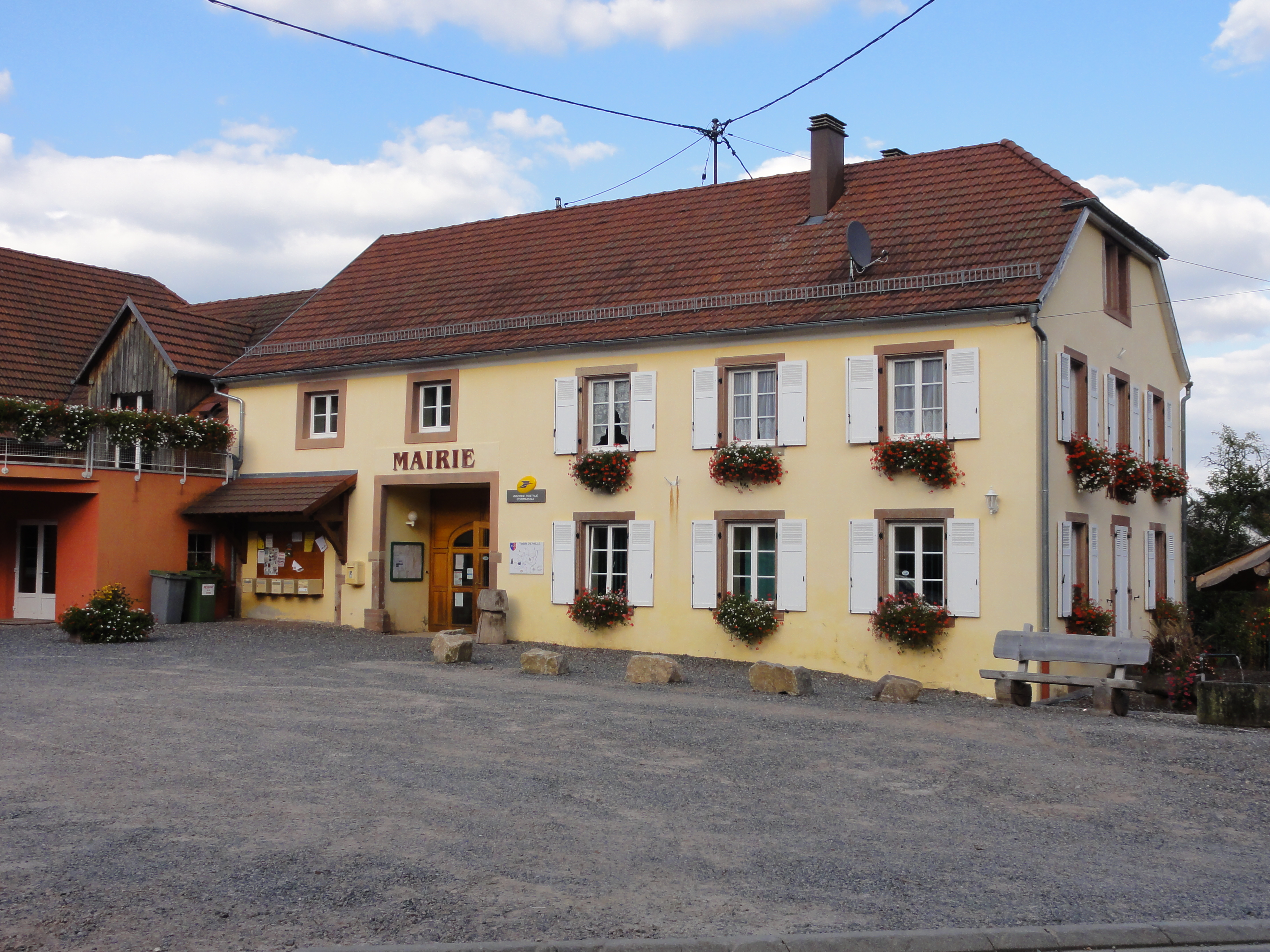 Alsace, Bas-Rhin, Saulxures, Mairie-école (1865), 3-5 rue des Ecoles.